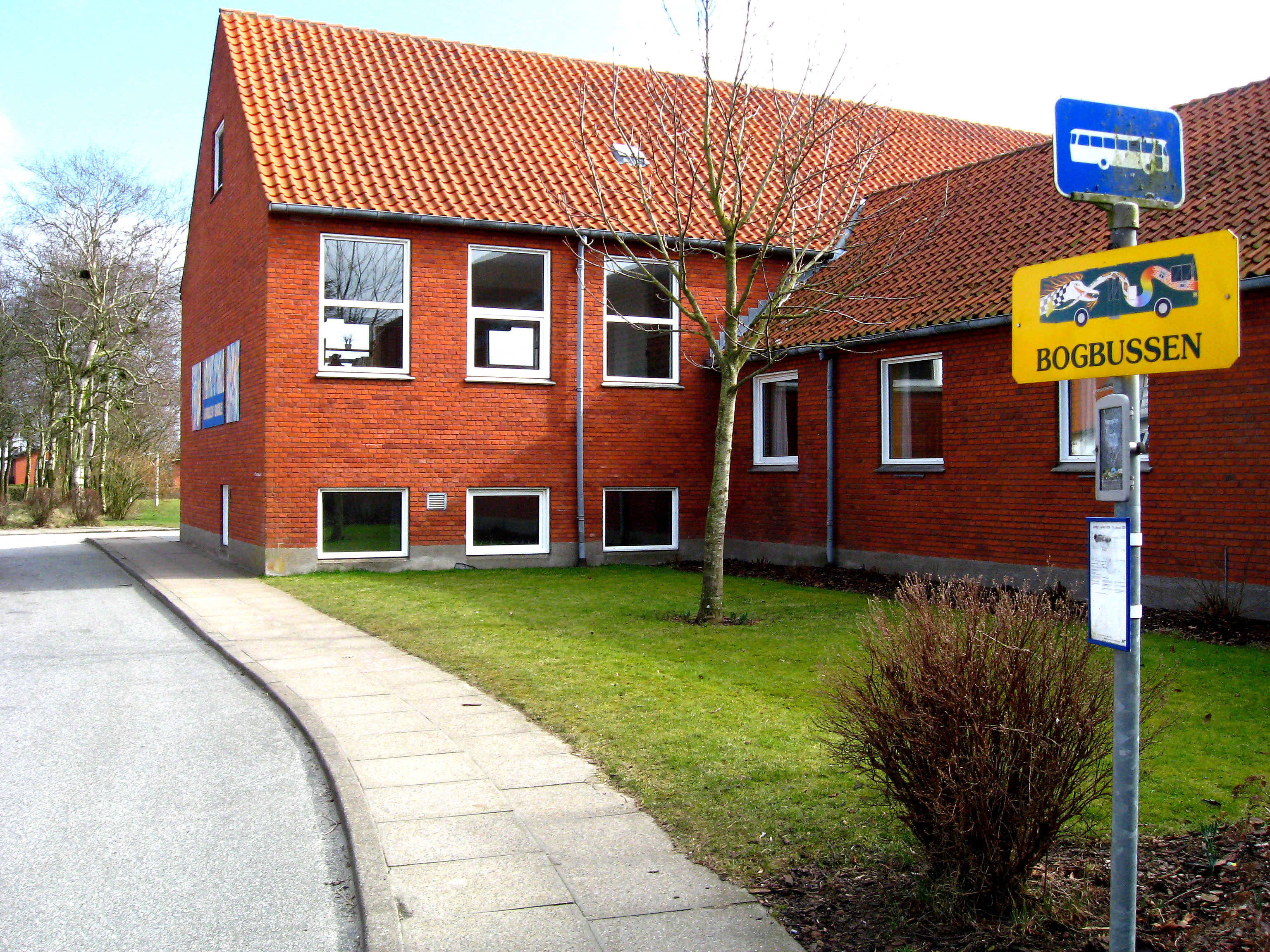 Bogbusholdeplads ved Lørslev Skole, Lørslev, Hjørring Kommune